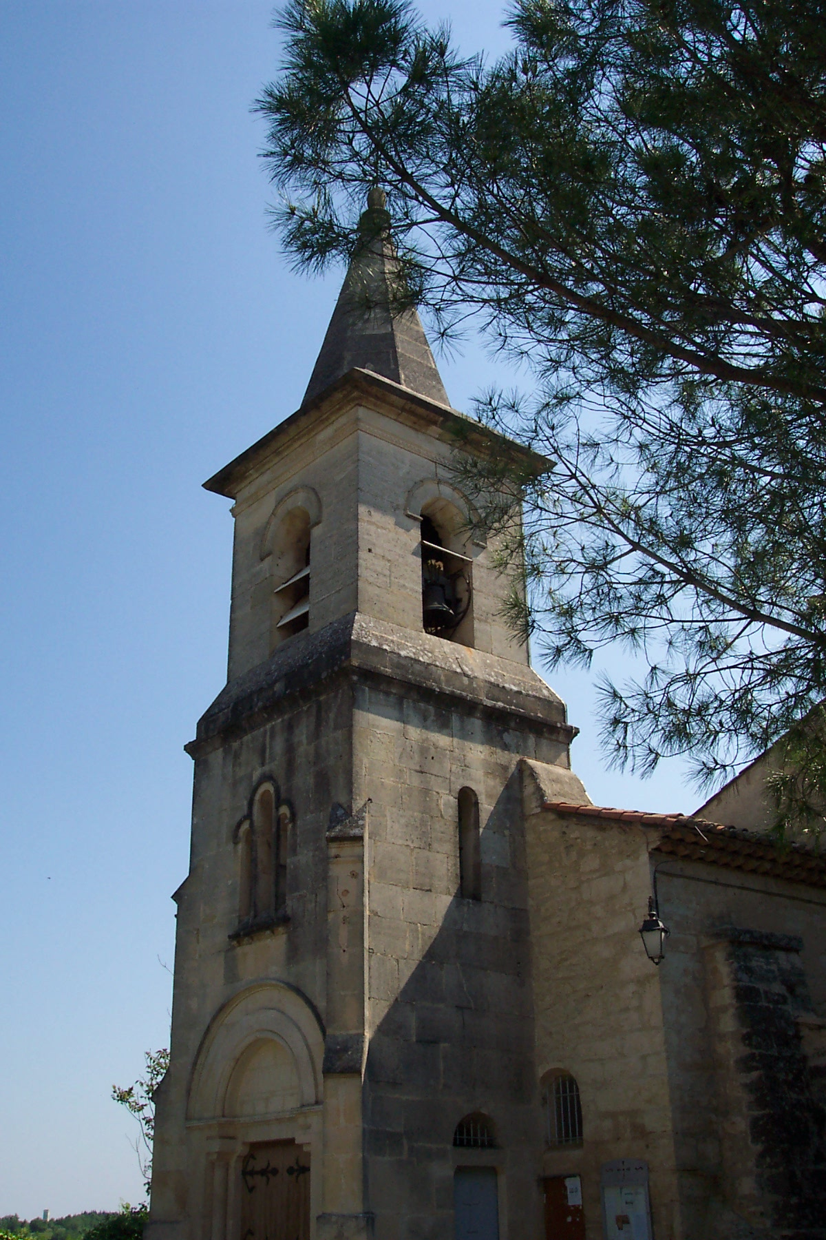 Le clocher de l'église de la Nativité-de-Saint-Jean-Baptiste de Saussan (Hérault)